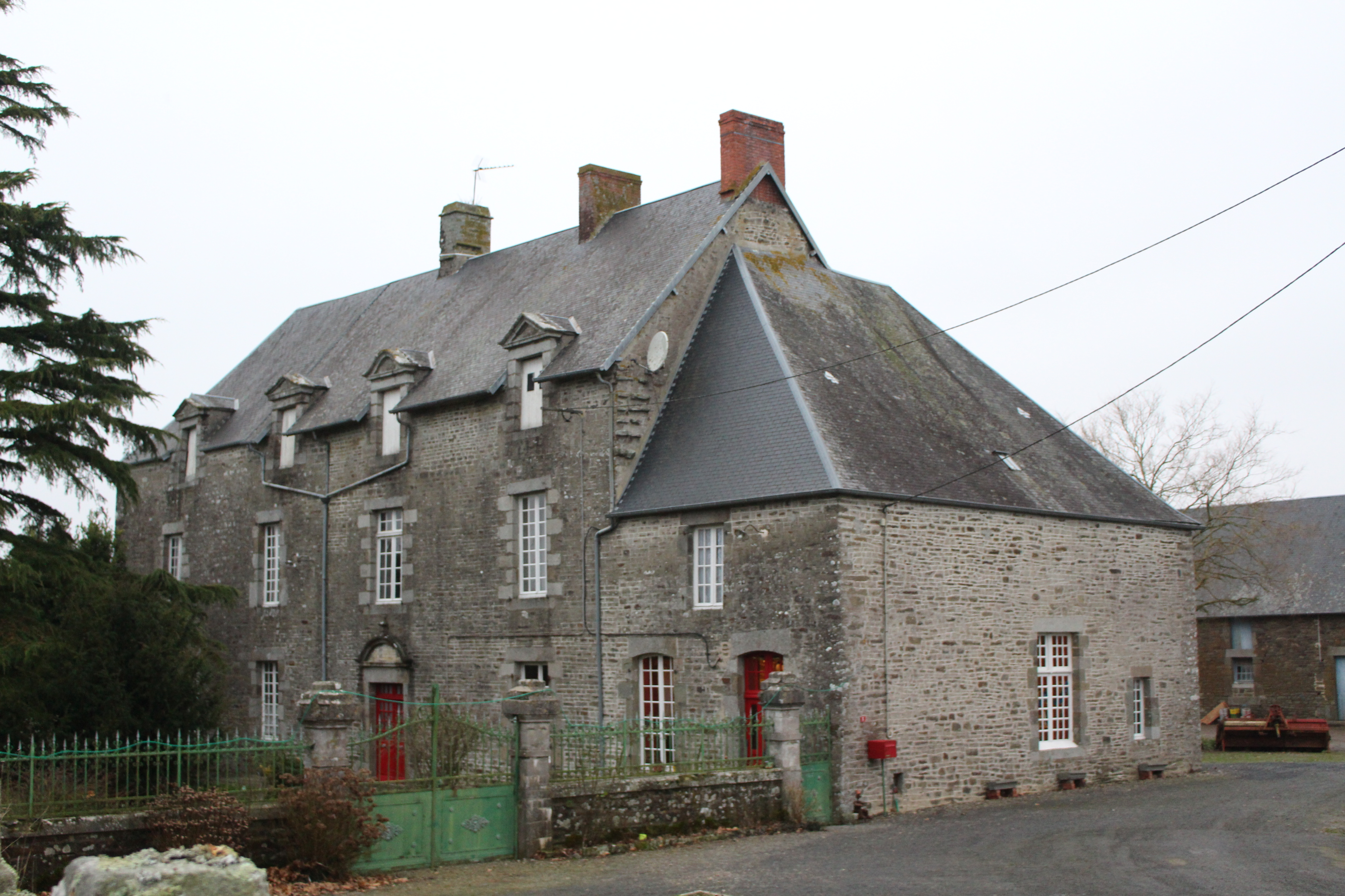 Le Mesnil-Villeman, Manche